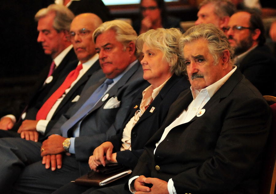 Ex presidentes Tabaré Vázquez, Jorge Batlle y Luis Alberto Lacalle, Lucía Topolansky y Presidente José Mujica presentes en el Lanzamiento de Bicentenario Uruguay en el Palacio Legislativo, 15 de febrero 2011. Foto: Pata Torres